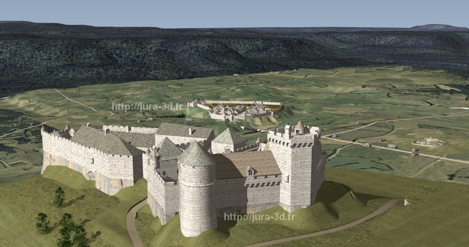 Etat restitué du château du mont Rivel au XVe siècle. Vue du nord-est.